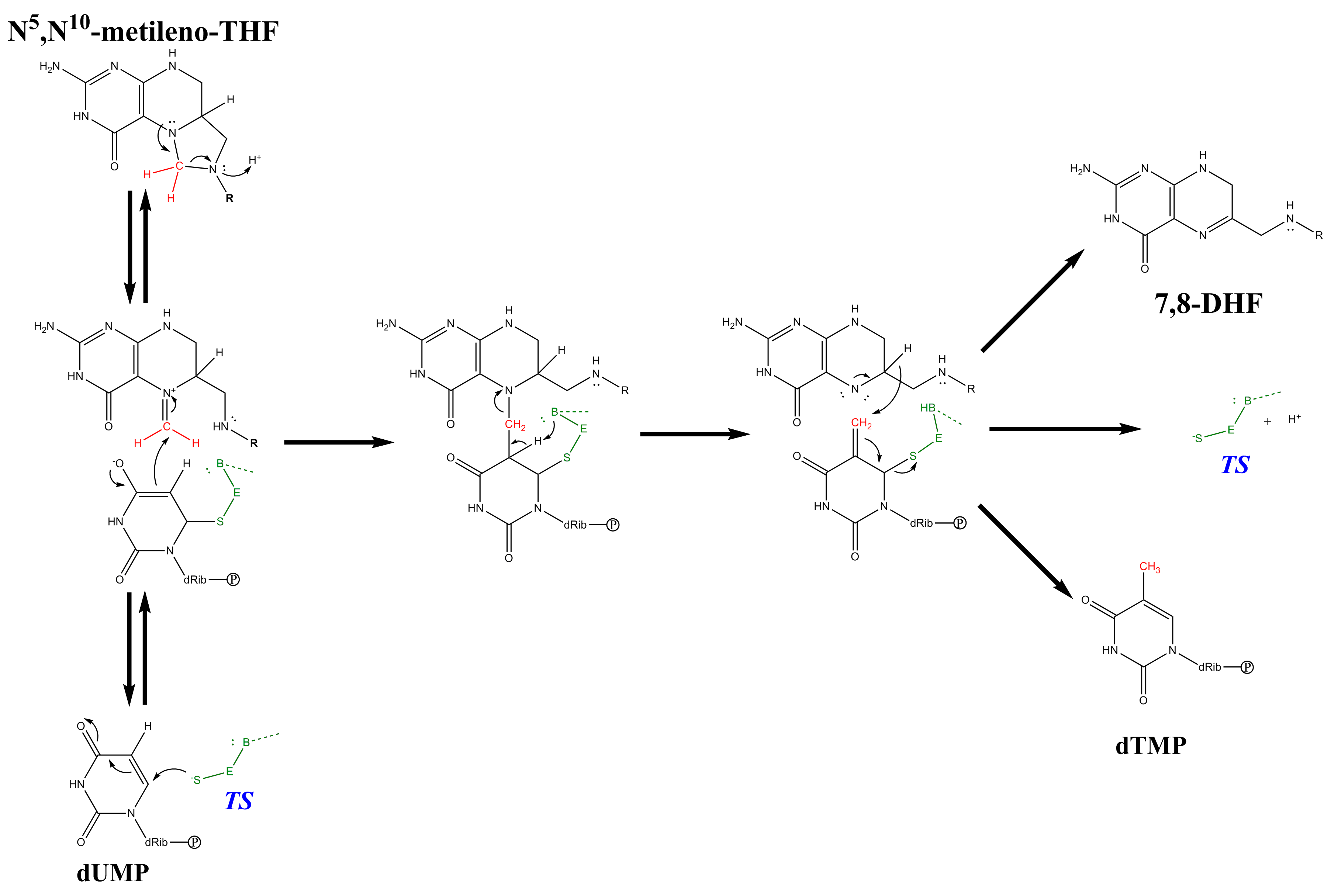 Mecanismo TYMS